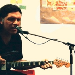 Richard Buckner